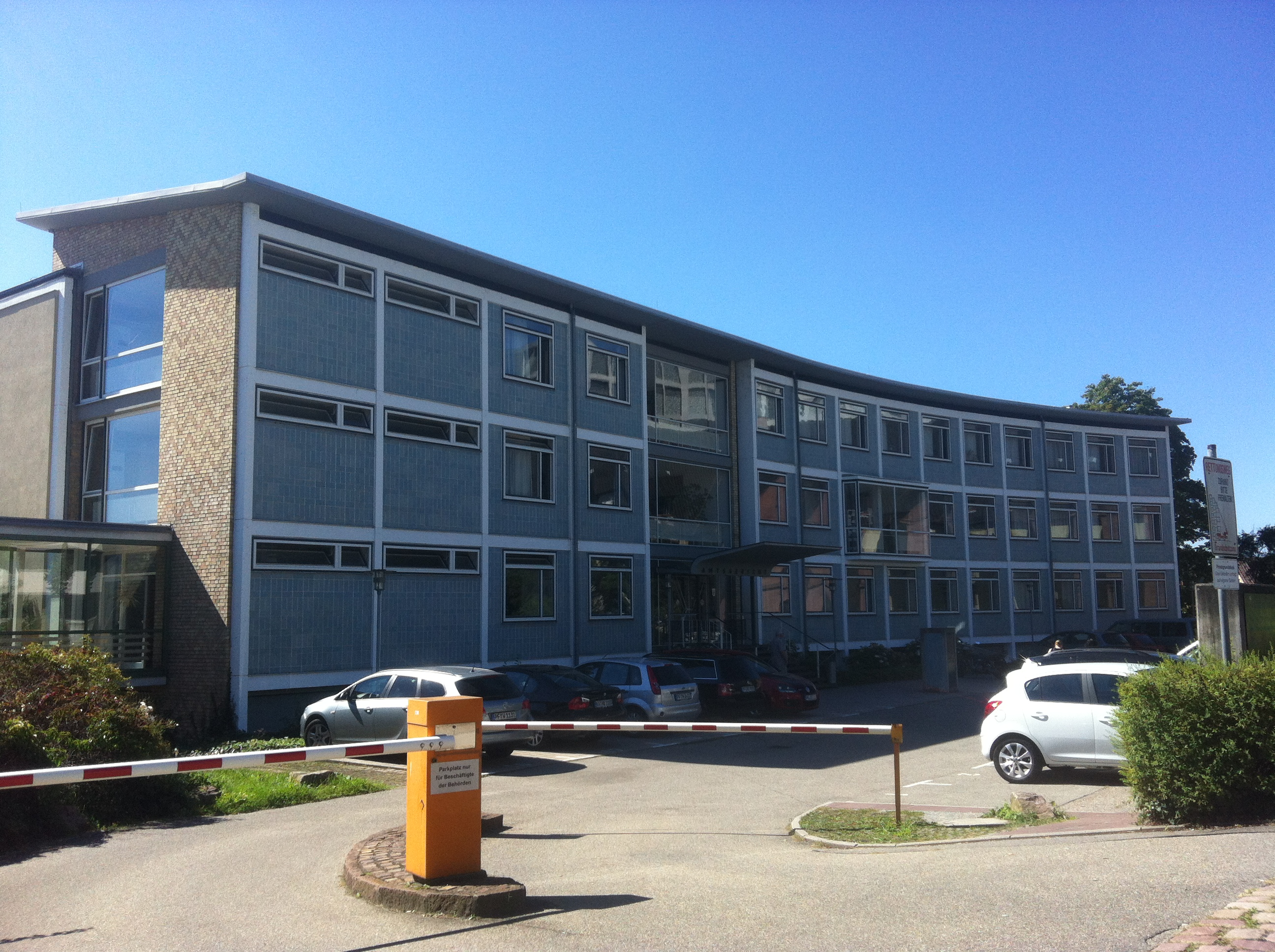 Amtsgericht Pforzheim